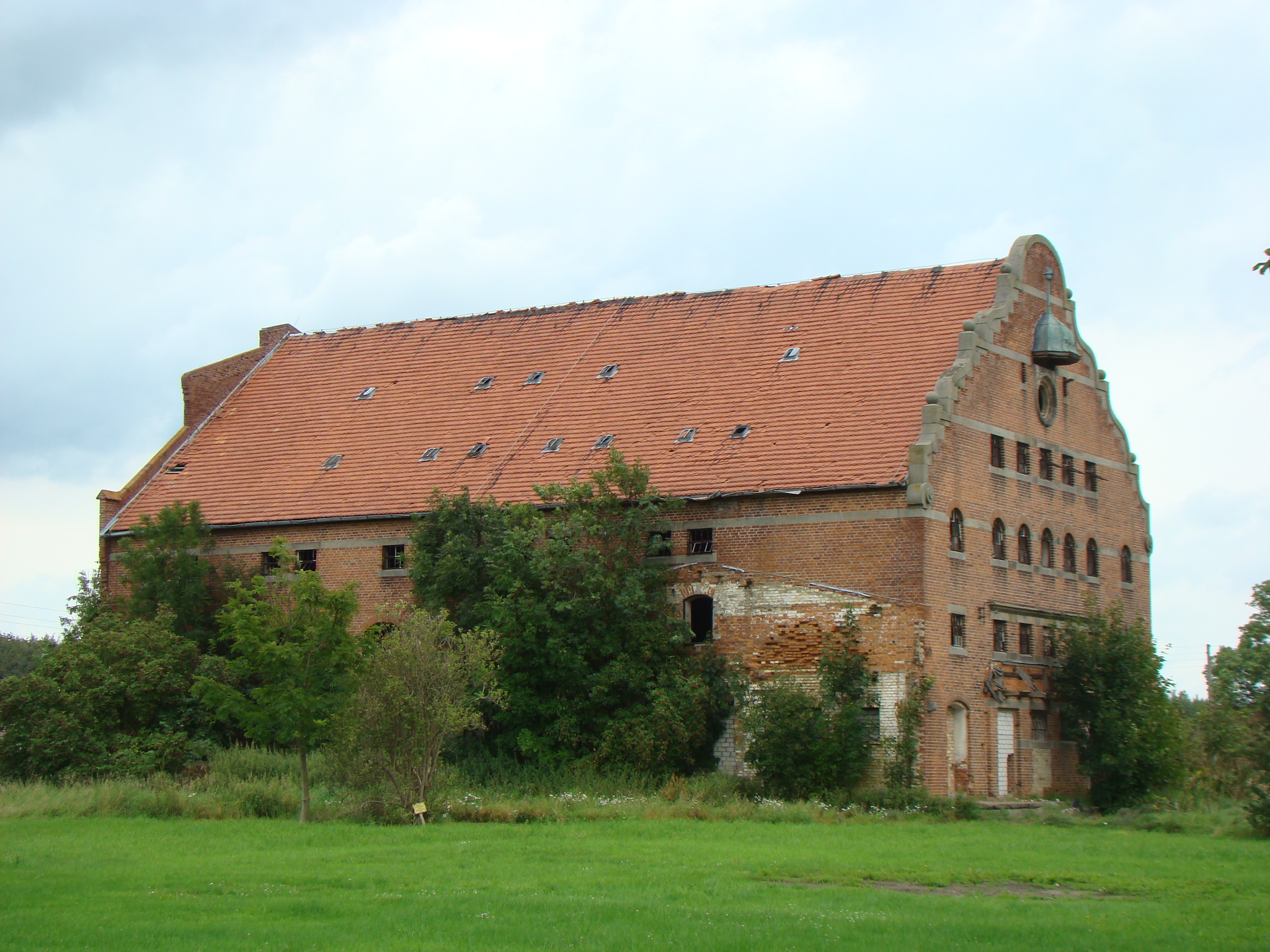 Historisches Wirtschaftsgebäude in Leisten (Plau am See).